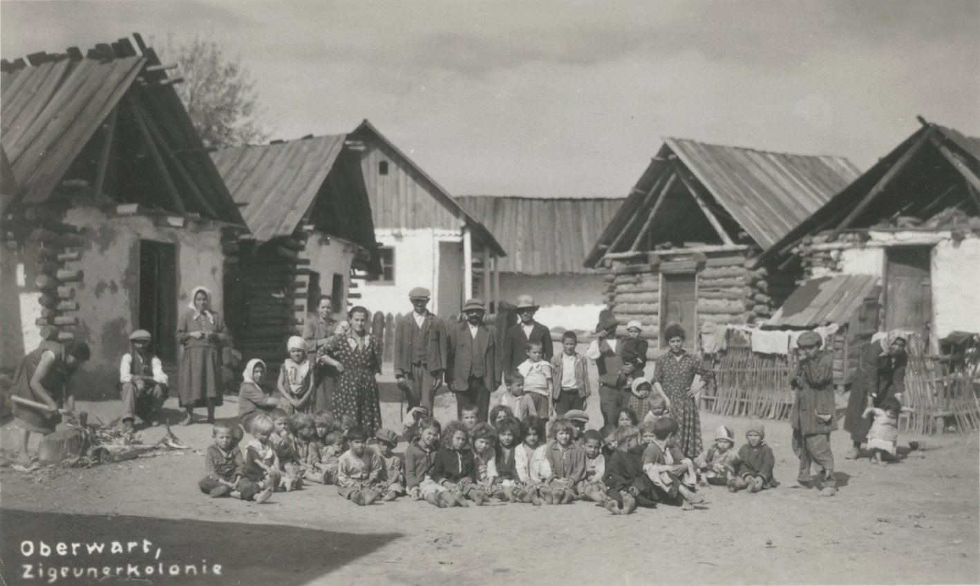 "Zigeunersiedlung Oberwart" - eine Fotografie aus den 1930er-Jahren der Roma und Sinti-Siedlung in Oberwart